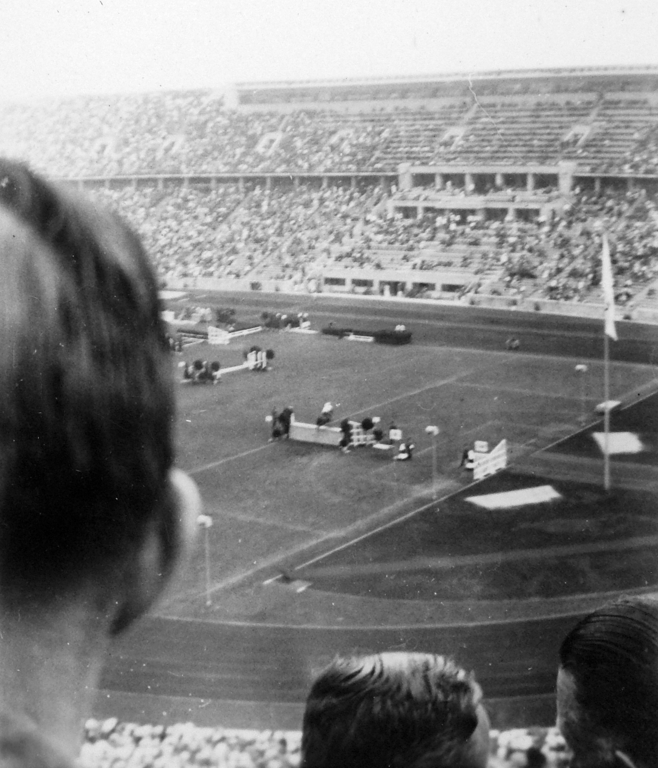 Olimpiai stadion. Location: Germany, Berlin Tags: Olympics, Berlin Olympics, equestrian sports Title: Olimpiai stadion.